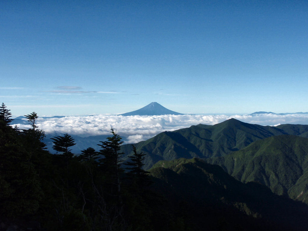 甲武信岳頂上より富士山を望む